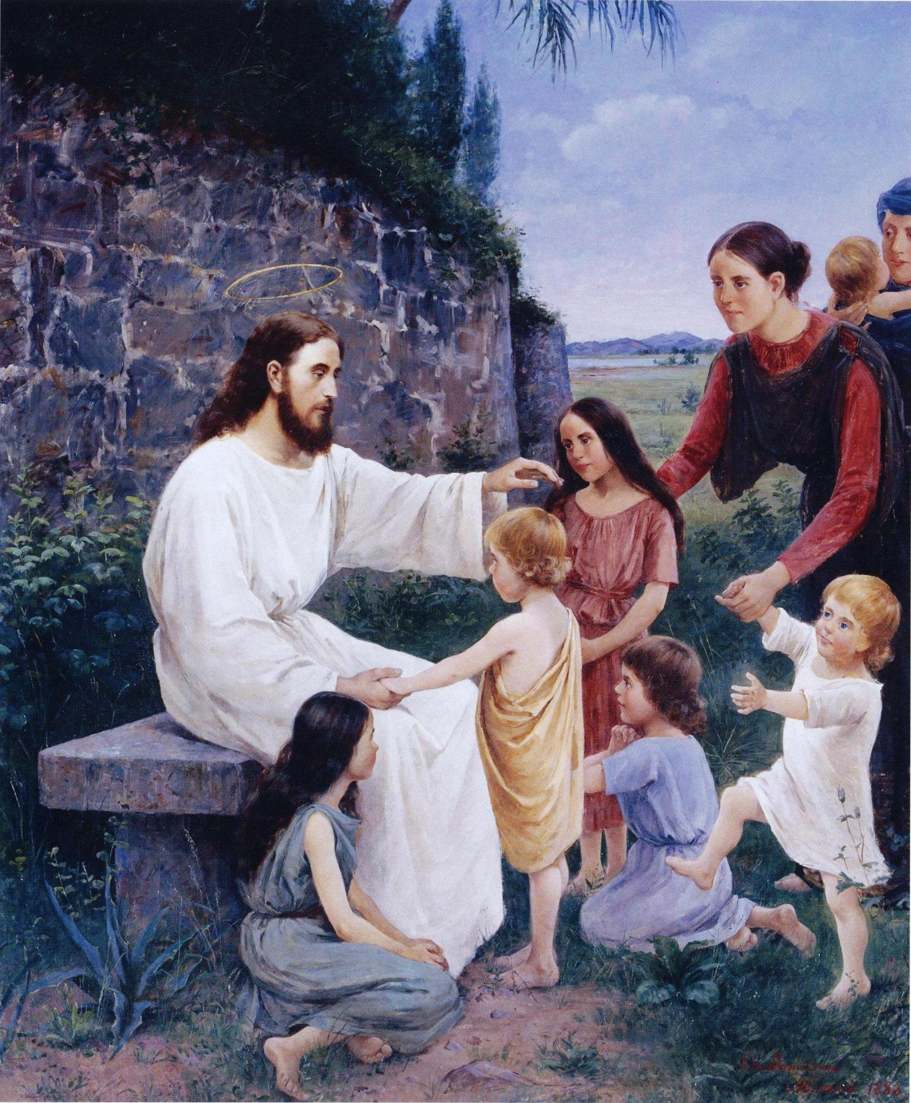 Elin Danielson-Gambogin maalaama Ahlaisten kirkon alttaritaulu, maalattu Pariisissa. Kristuksen mallina oli sama mies kuin Mihály Munkácsyn maalauksessa Kristus Pilatuksen edessä.